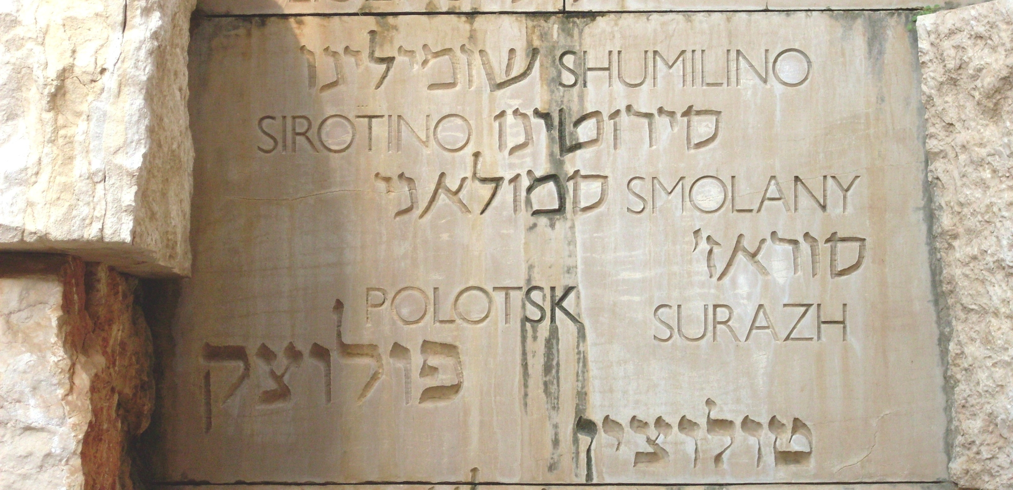 Белорусская часть "Долины разрушенных общин" в Яд Вашем с с названиями еврейских общин на территории послевоенной Беларуси, частично или полностью уничтоженных во время Холокоста. Полоцк, Сиротино, Смоляны, Сураж, Шумилино.